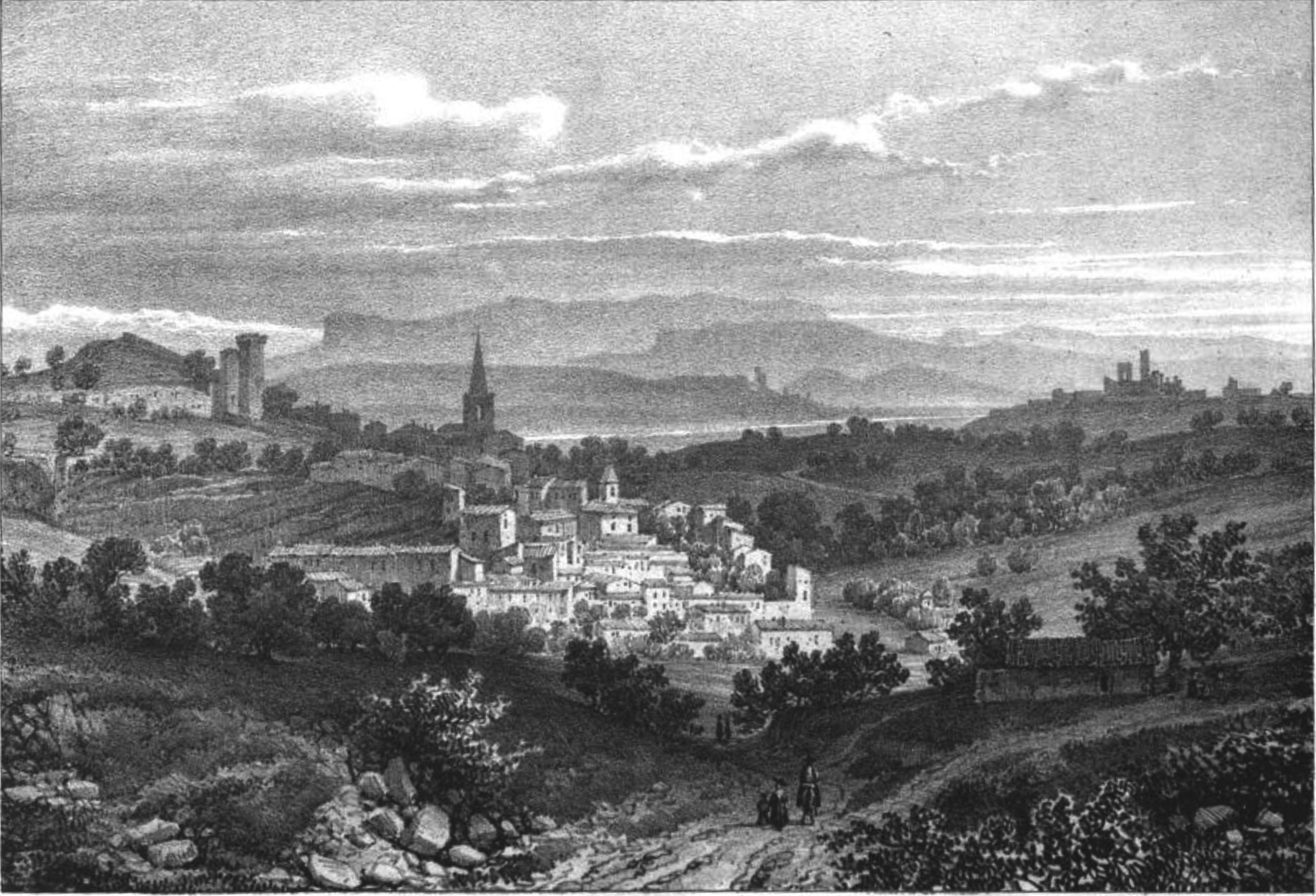 Grâne (Drome)